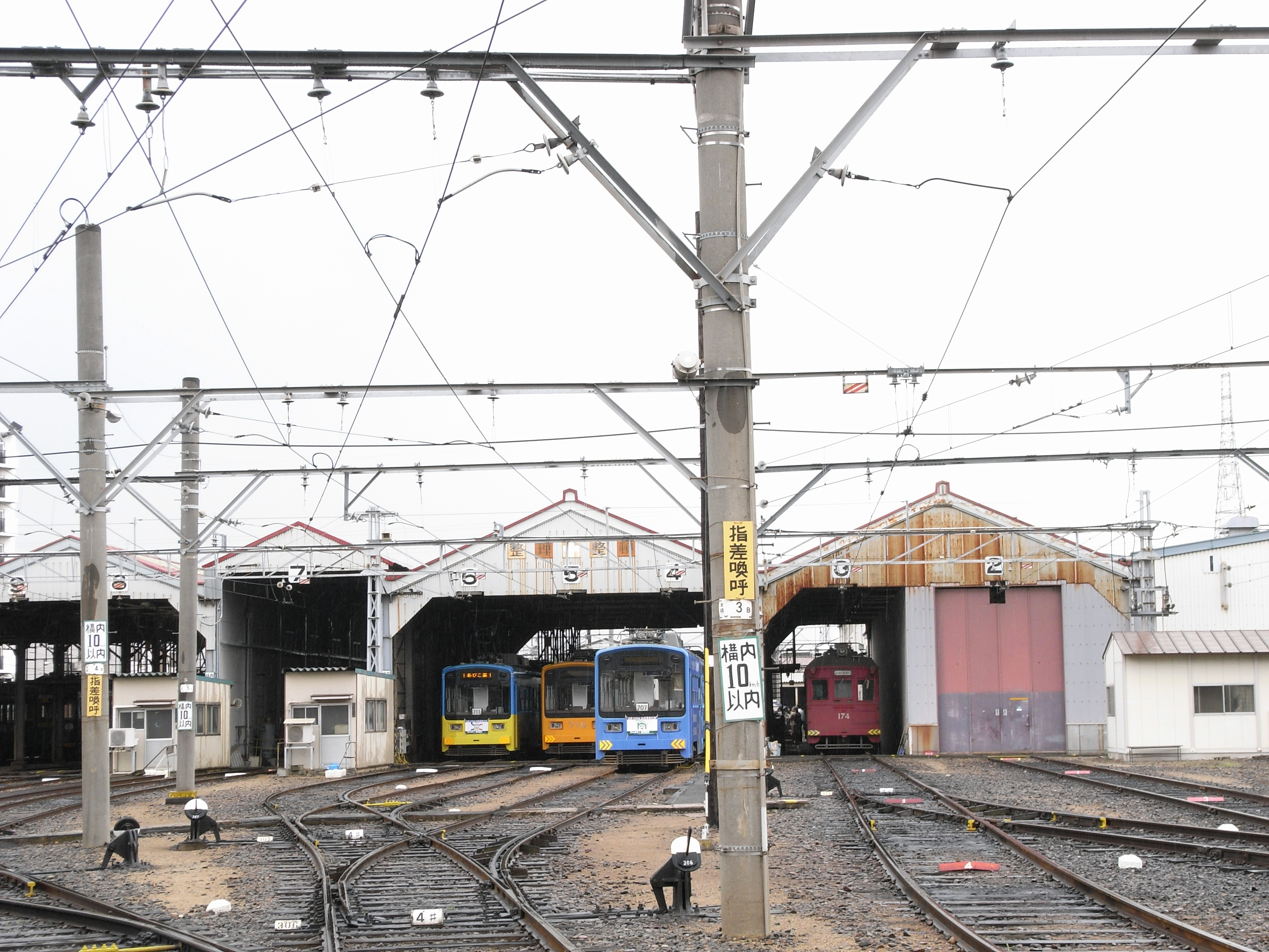 阪堺電車まつり